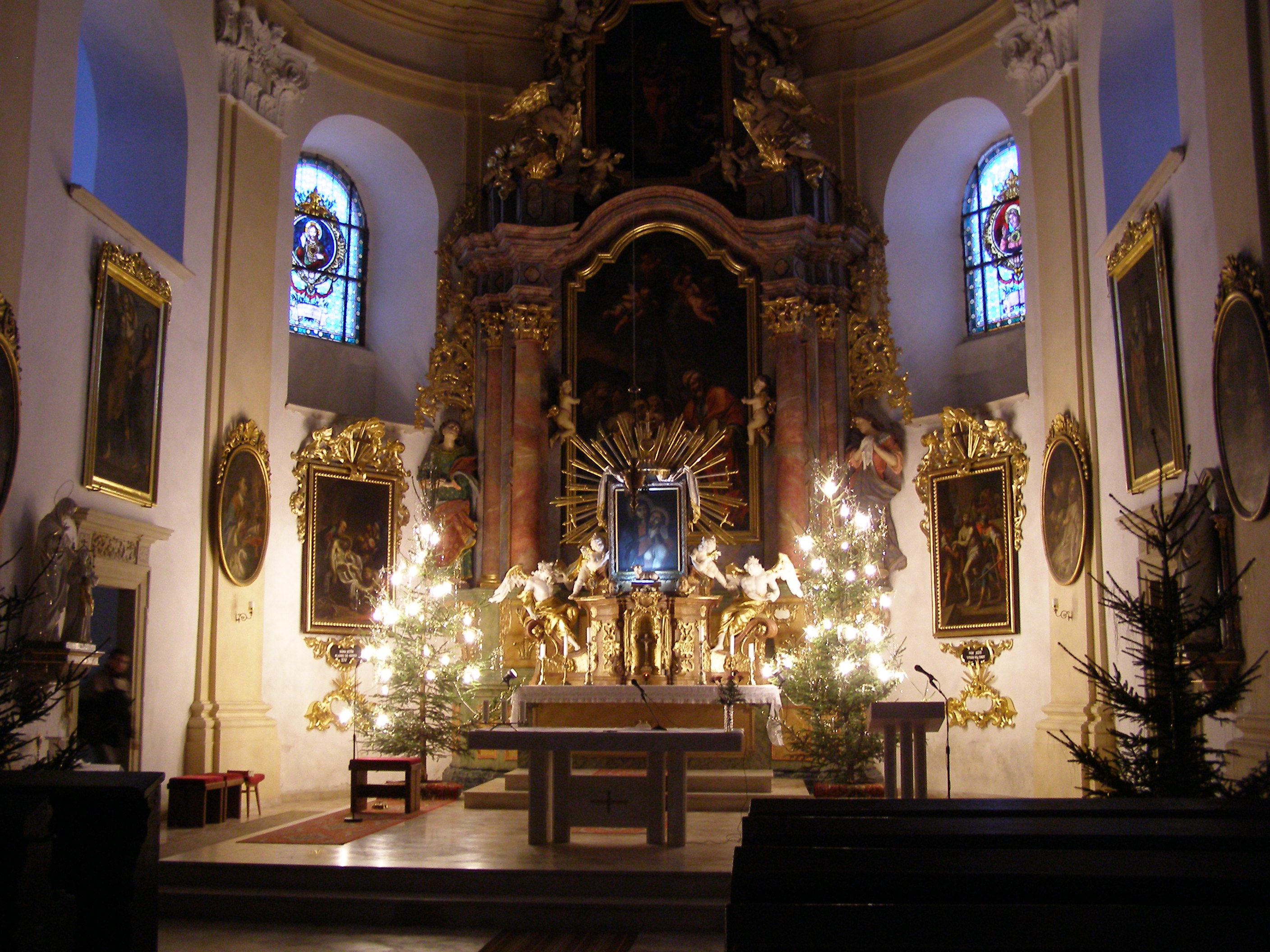 Jívová - barokní kostel sv. Bartoloměje, postavený v letech 1717-1720